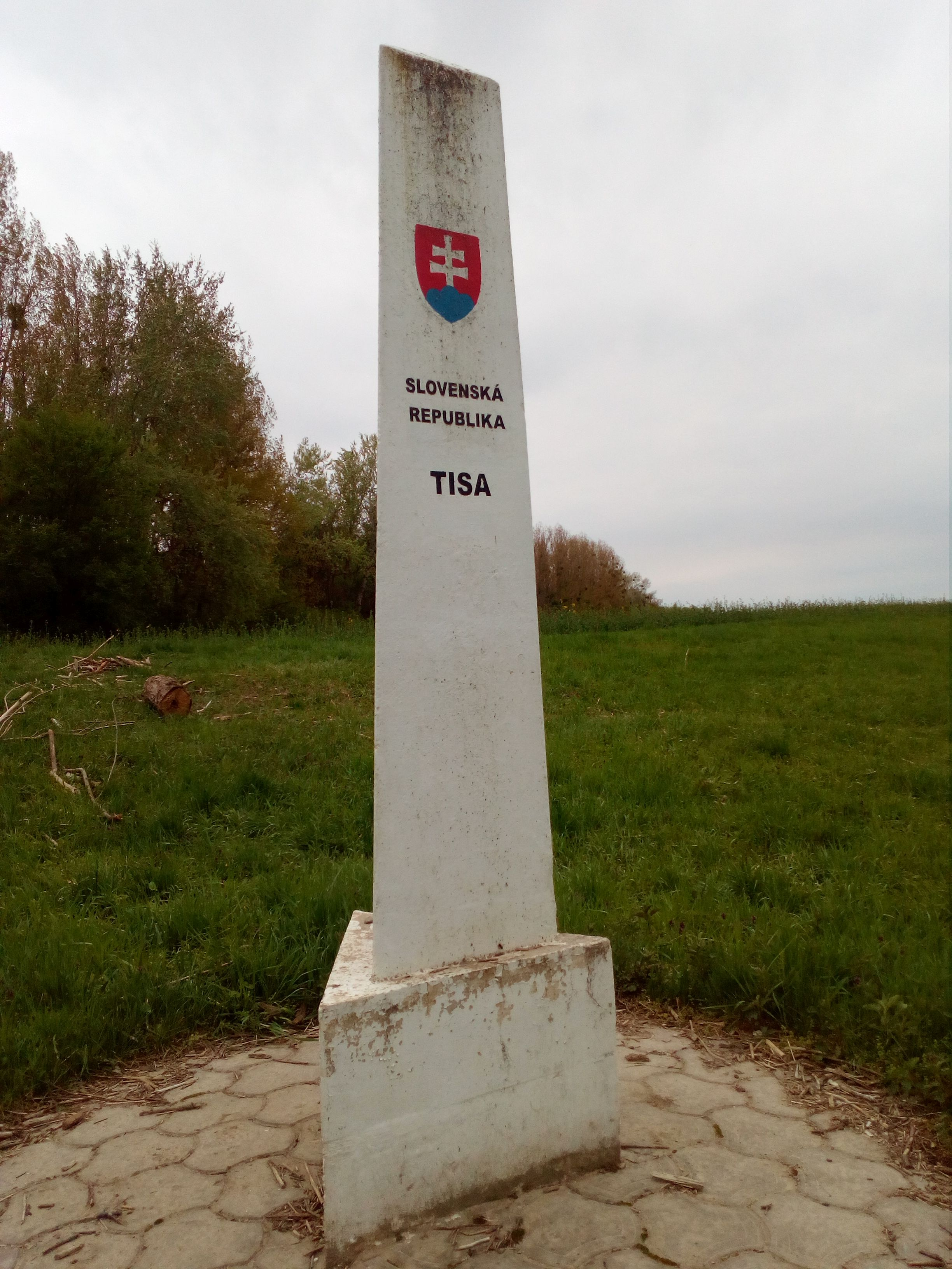 Trojmedzie Slovensko-Maďarsko-Ukrajina. Hraničný znak TISA/SK